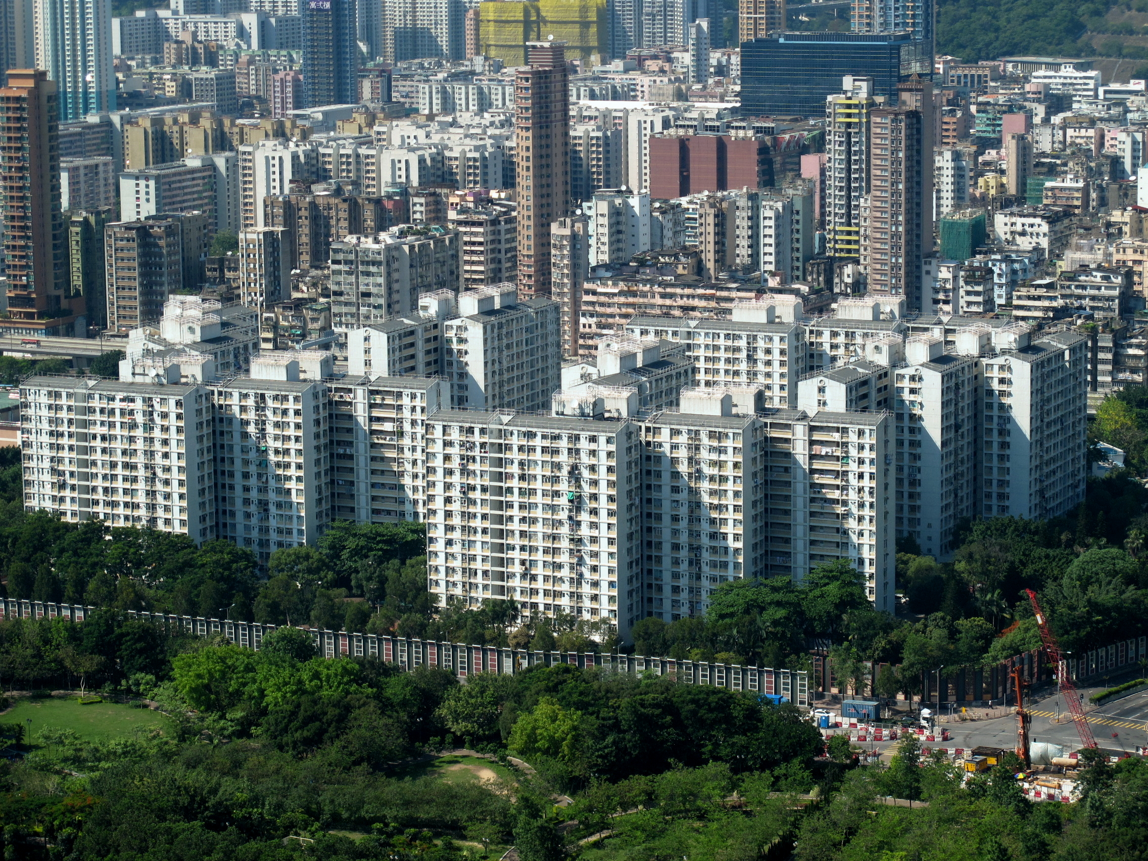 Nam Cheung Estate